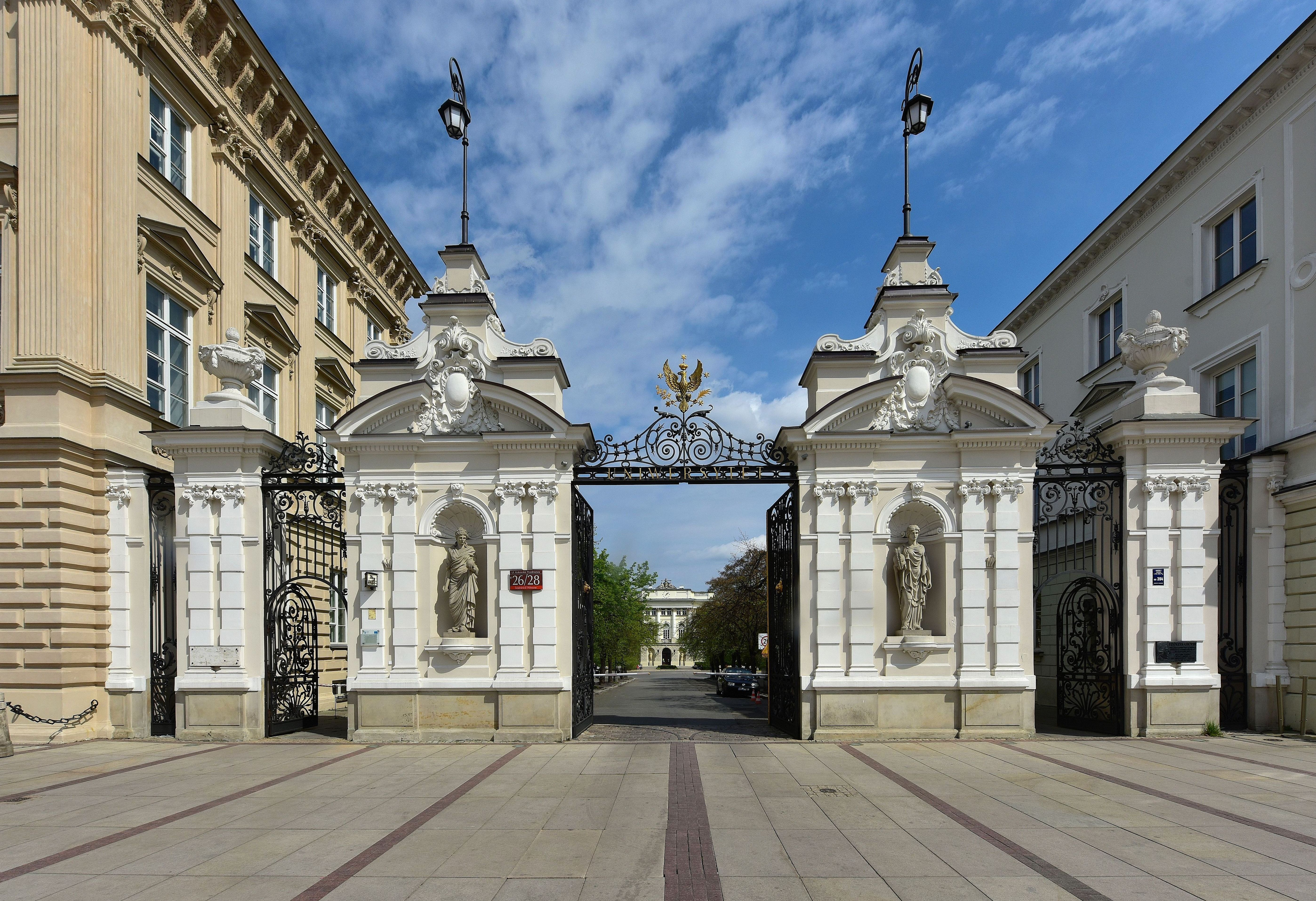 Brama Główna do kampusu centralnego Uniwersytetu Warszawskiego przy ul. Krakowskie Przedmieście 26/28